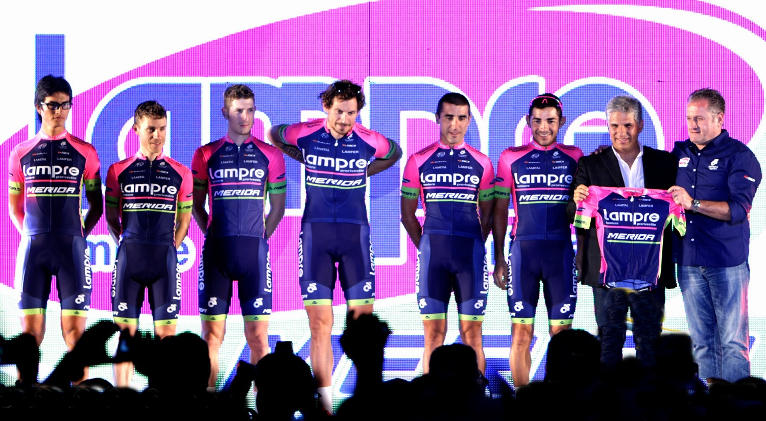 El Lampre Merida en la Presentación del Tour de San Luis 2014.